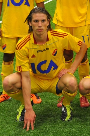 Carl Björk